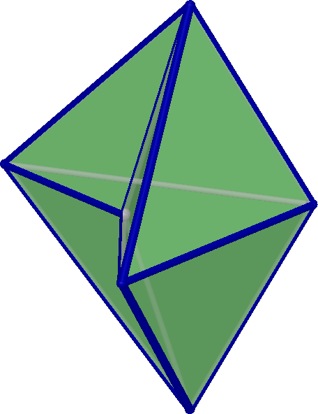 凹鷂形雙錐 的模型 基底為凹鷂形的雙錐體